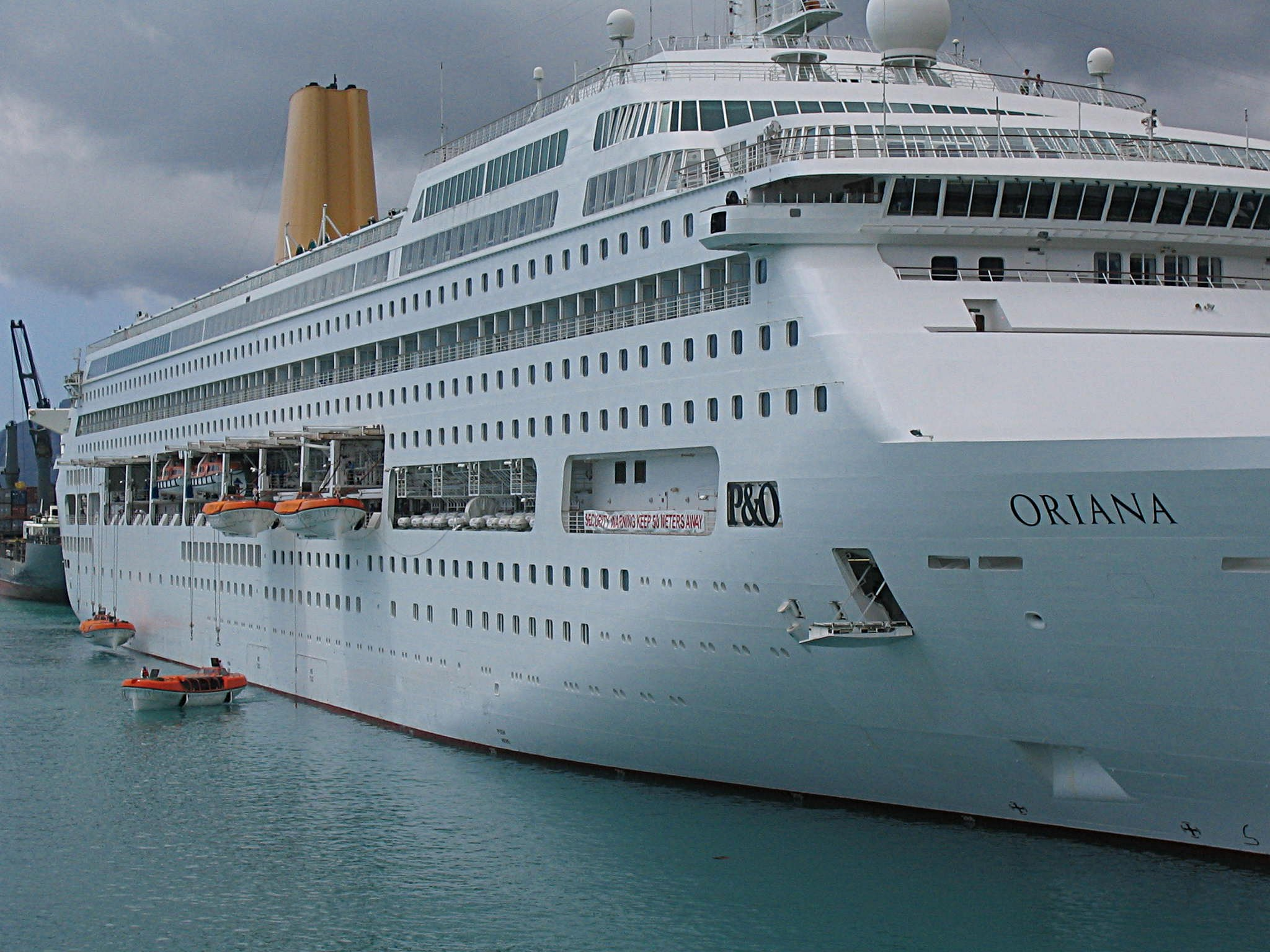 Mise à l'eau de canots de sauvetage sous bossoirs télescopiques. Exercice d'abandon. Abandon exercice. Passenger vessel.